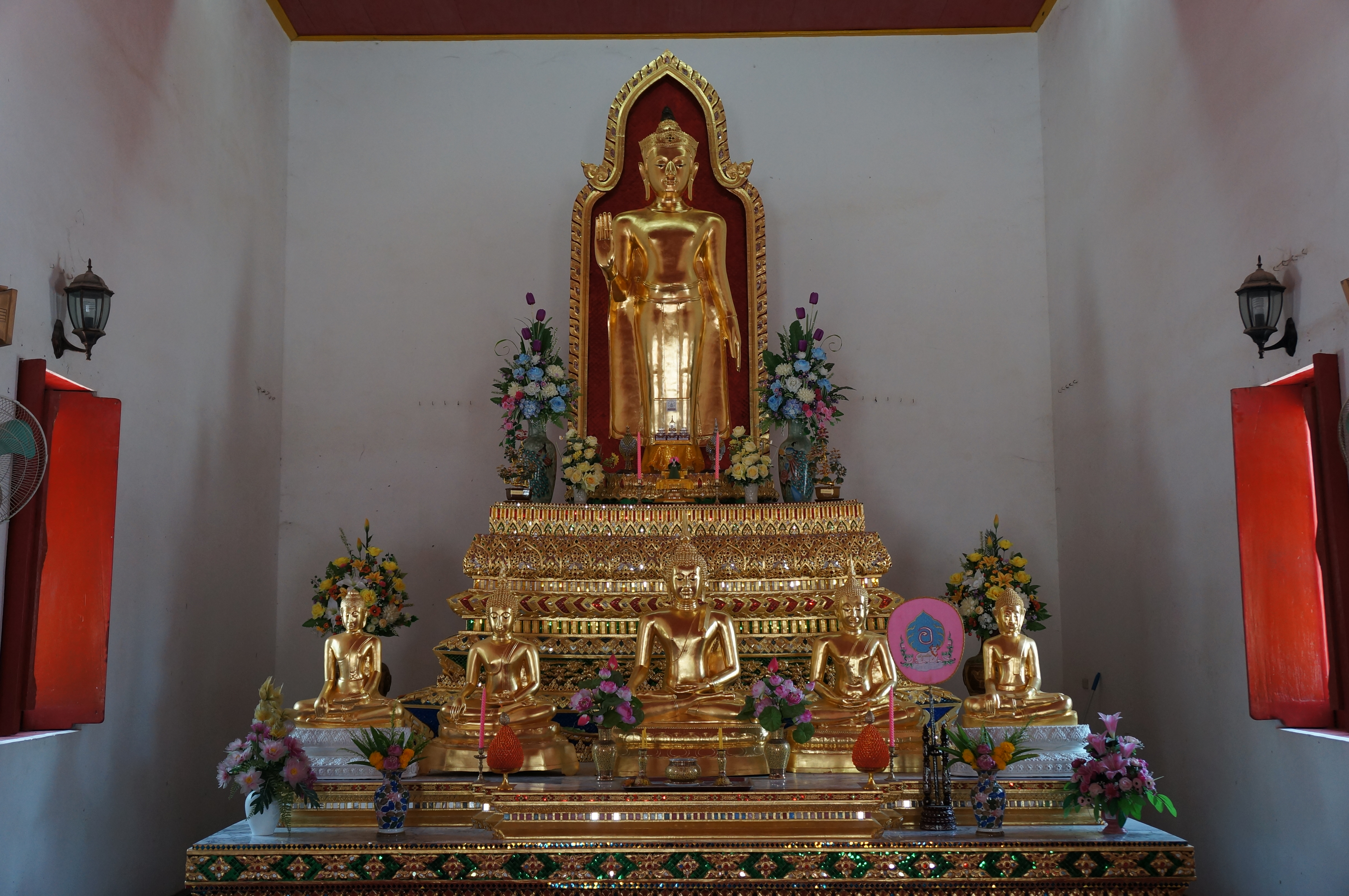 วัดท่าไชยศิริ เป็นวัดในพระพุทธศาสนาเถรวาท สังกัดคณะสงฆ์มหานิกาย ที่ดำเนินกิจกรรมทางพระพุทธศาสนา บ้านสมอพลือ ถนนเพชรเกษม หมู่ที่ ๑ ตำบลสมอพลือ อำเภอบ้านลาด จังหวัดเพชรบุรี